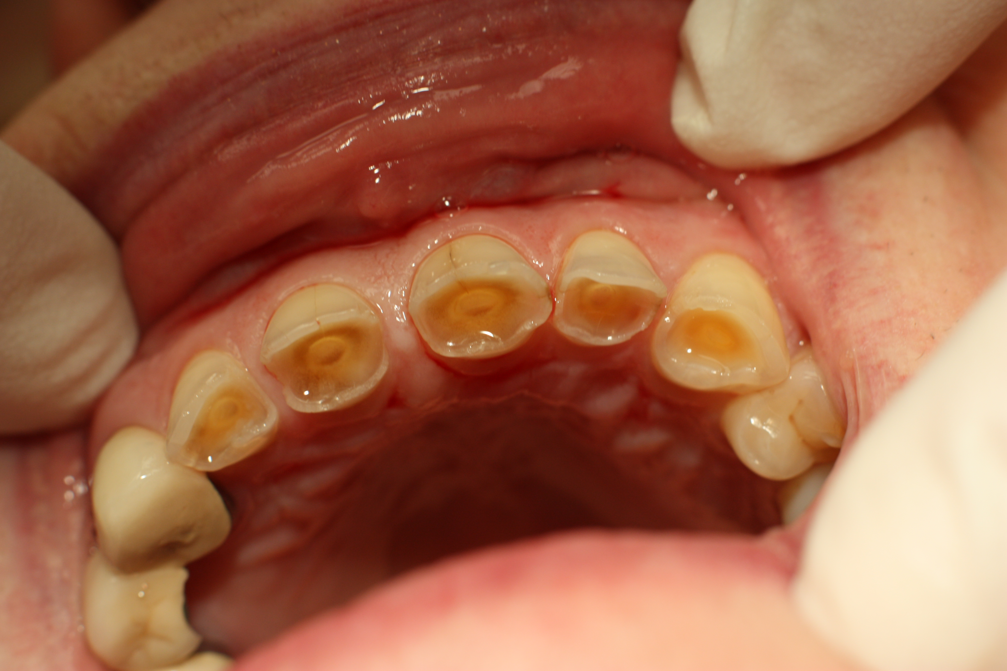 Oberkieferfrontzähne mit massiver Abrasion, die Patientin ist ca. 55 jahre alt